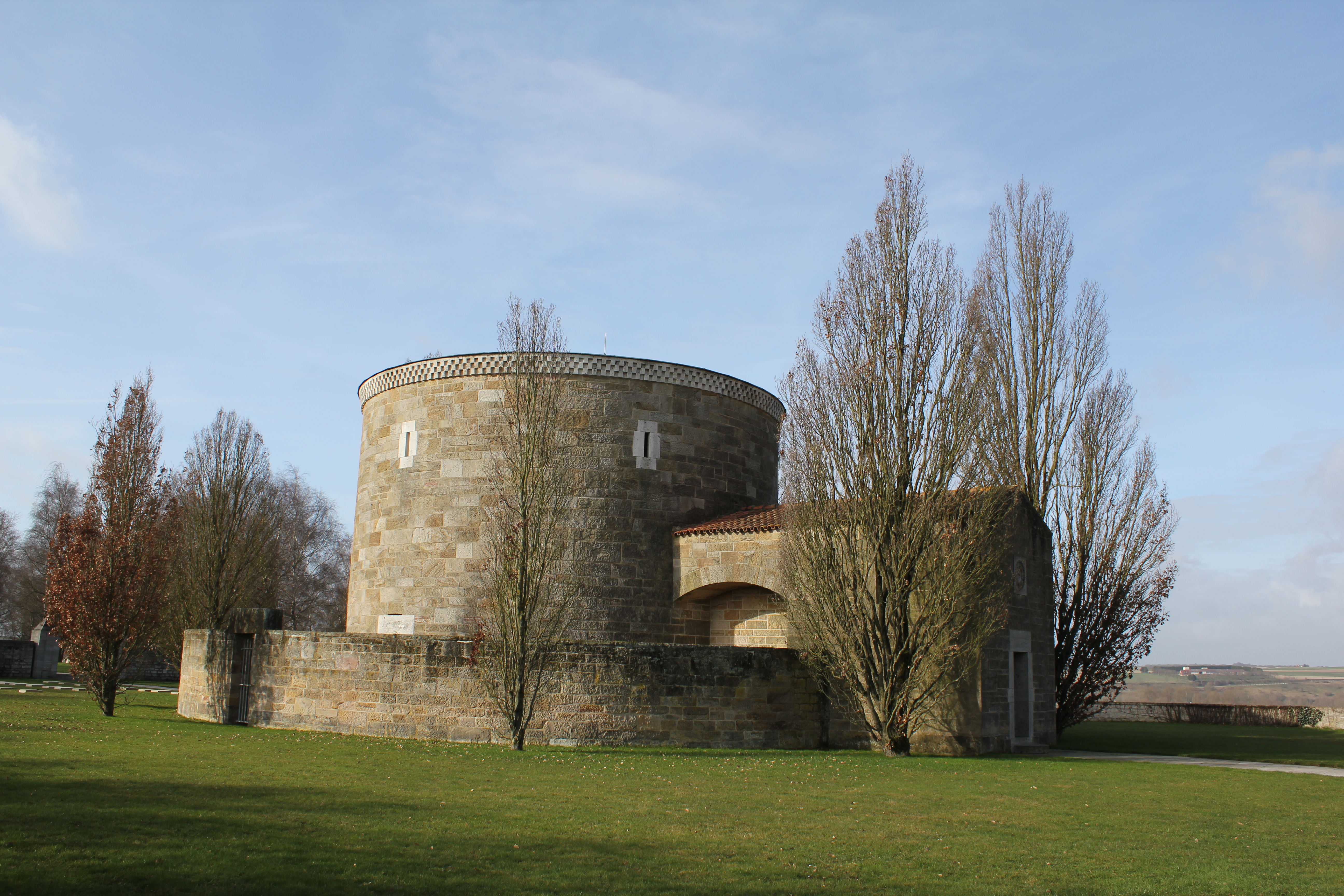 deutscher Soldatenfriedhof bei Bourdon, Frankreich, Nordostansicht des Hauptgebäudes, Architekt Paul Schmitthenner